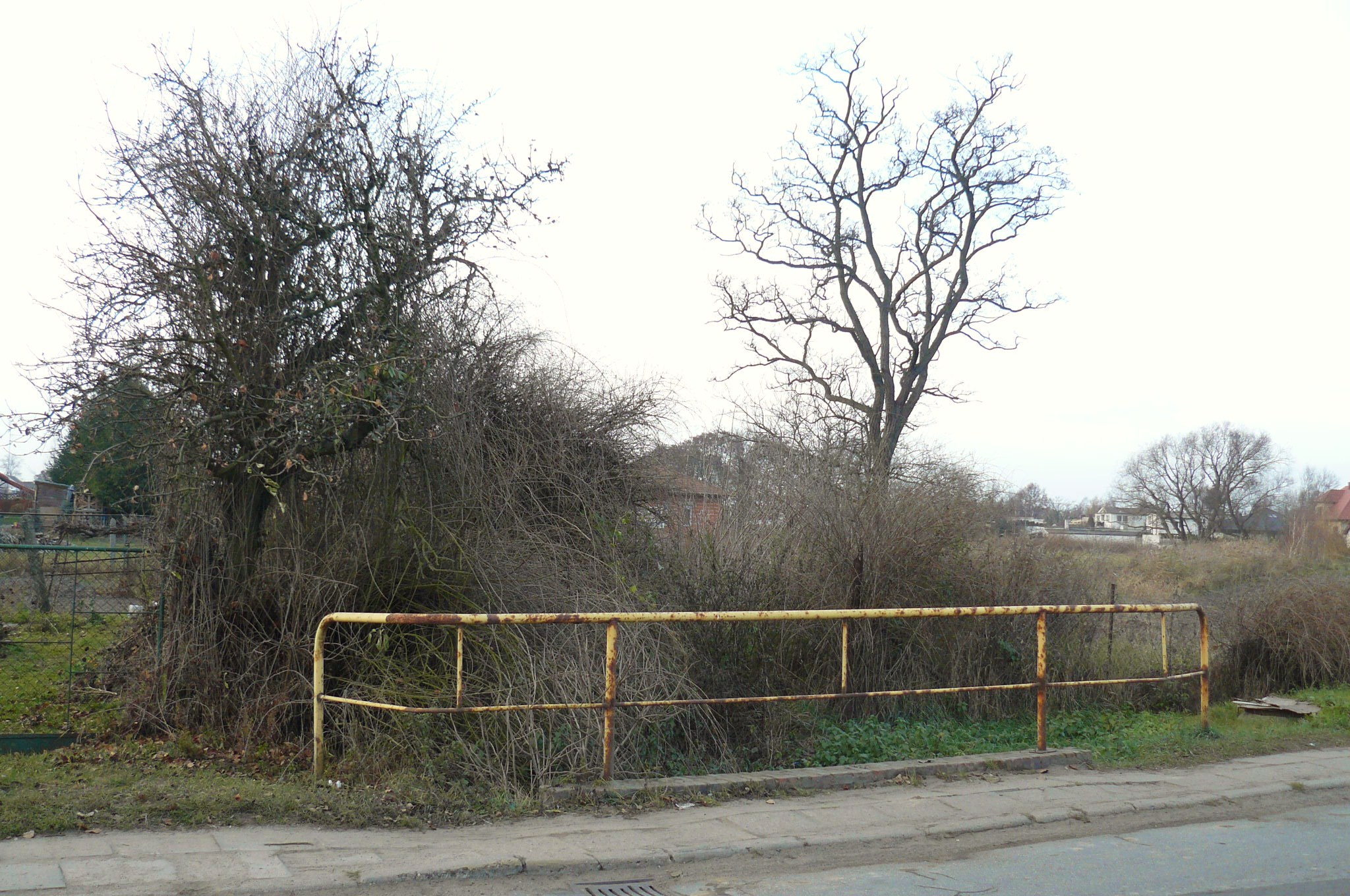 Poznań, Gospodarska Street (Spławie) - Dworski Rów river.